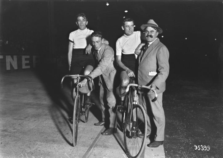 Francis et Henri Pélissier vainqueurs des 50km à l'américaine au vélodrome Buffalo le 18 septembre 1924.